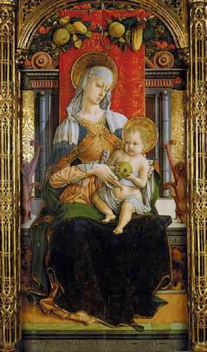 Crivelli, madonna di ascoli